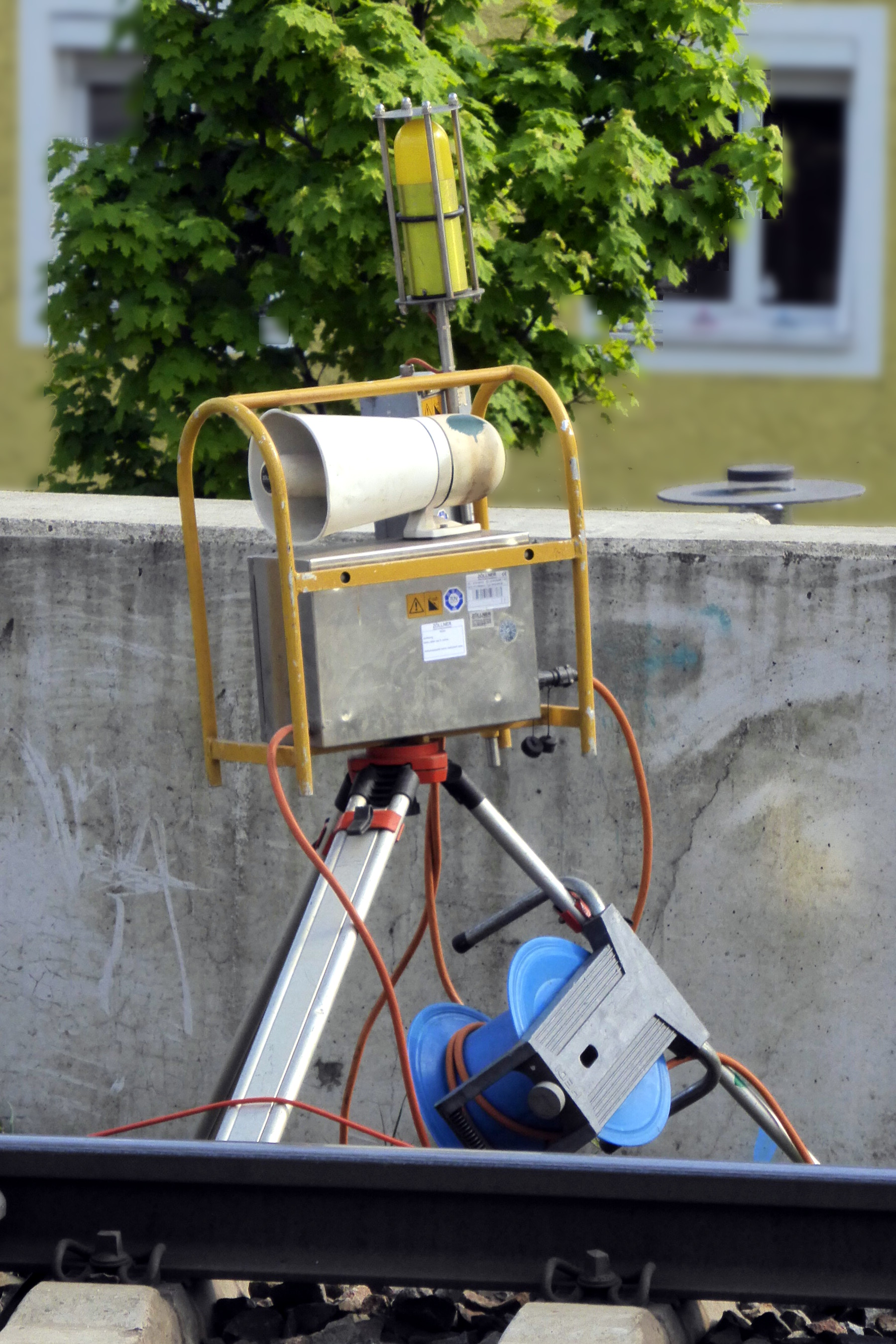 Optisch-akustisches Warngerät für Eisenbahnbaustellen ("Rottenwarnanlage"), mit Stativ, in München – Berg am Laim.